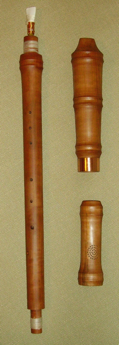 Alt-Cornamuse in F aus Birnbaum (Rekonstruktion von Dominik Bauer, Saarbrücken) Links: Das Mittelstück mit aufgestecktem Doppelrohrblatt. Rechts oben: Windkapsel. Rechts unten: Fußstück